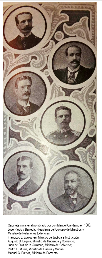 Gabinete ministerial integrado por José Pardo y Barreda, Presidente del Consejo de Ministros y Ministro de Relaciones Exteriores; Augusto B. Leguía, Ministro de Hacienda y Comercio; Juan de Dios de la Quintana, Ministro de Gobierno; Francisco J. Eguiguren, Ministro de Justicia e Instrucción; Pedro E. Muñiz, Ministro de Guerra y Marina; y Manuel C. Barrios, Ministro de Fomento.